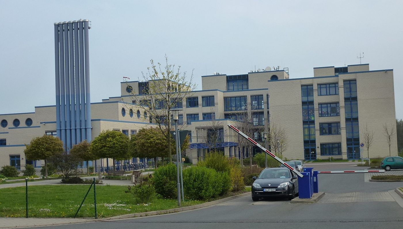 Klinikum Zeitz